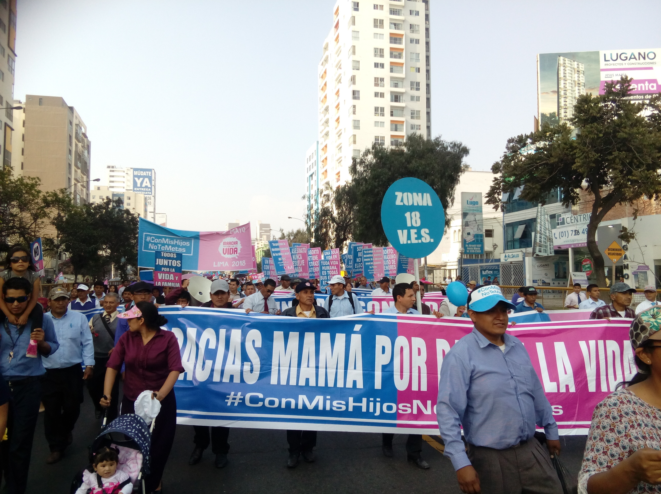 Manifestantes limeños (la mayoría del movimiento conservador Con mis Hijos no te Metas) en la Marcha por la Vida de 2018, Perú.